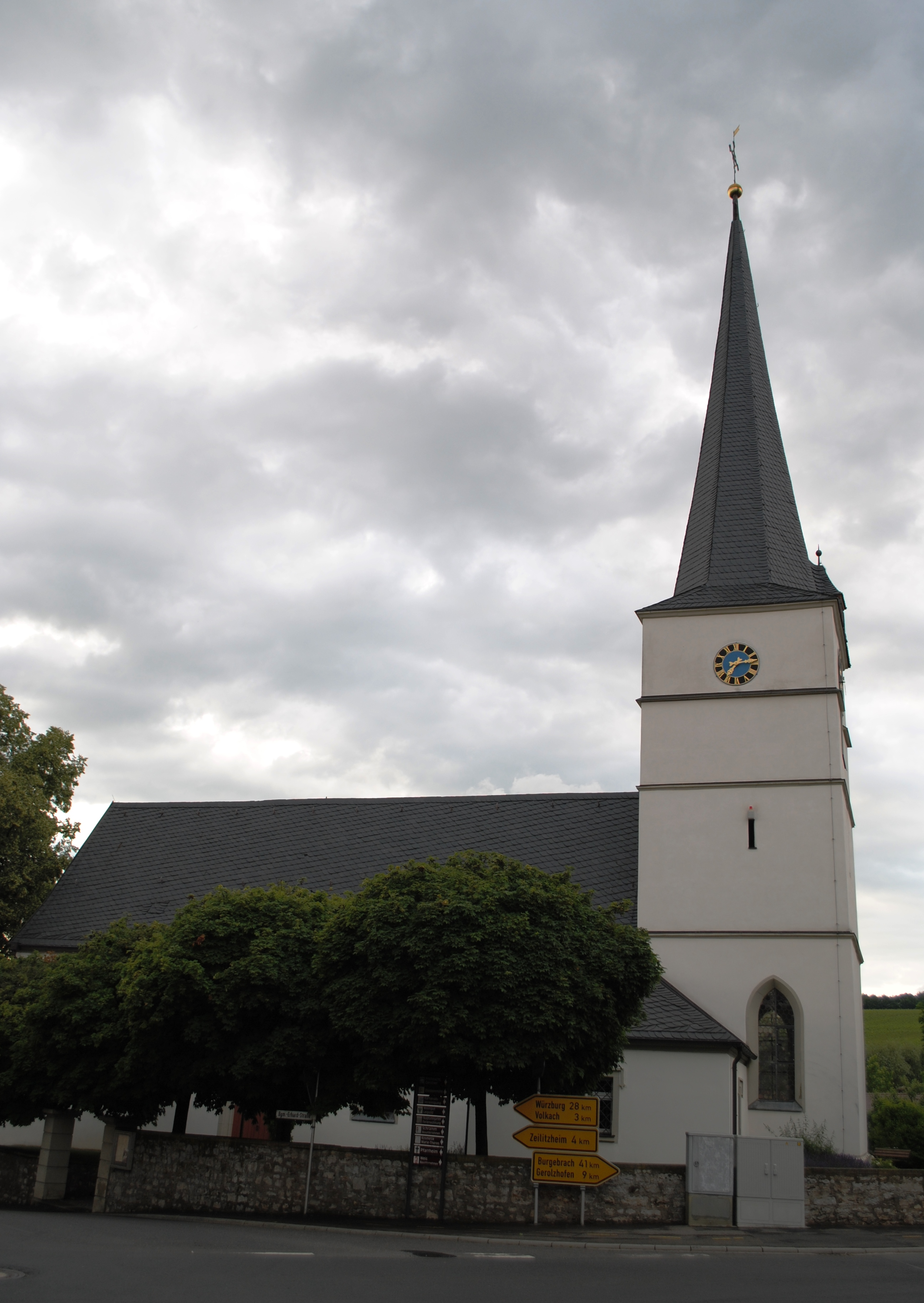 St. Nikolauskirche, Obervolkach, Volkach